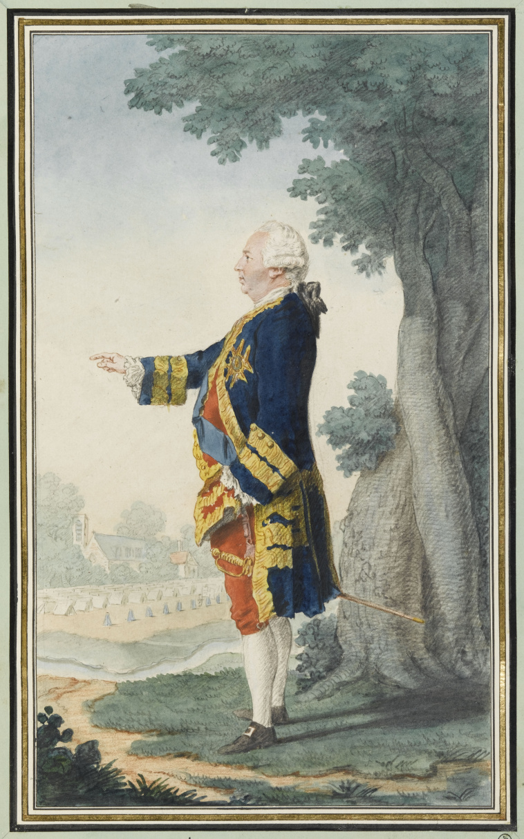 Christian-Frédéric comte de Waldner de Freundstein (1712-1783), Lieutenant général des armées du roi